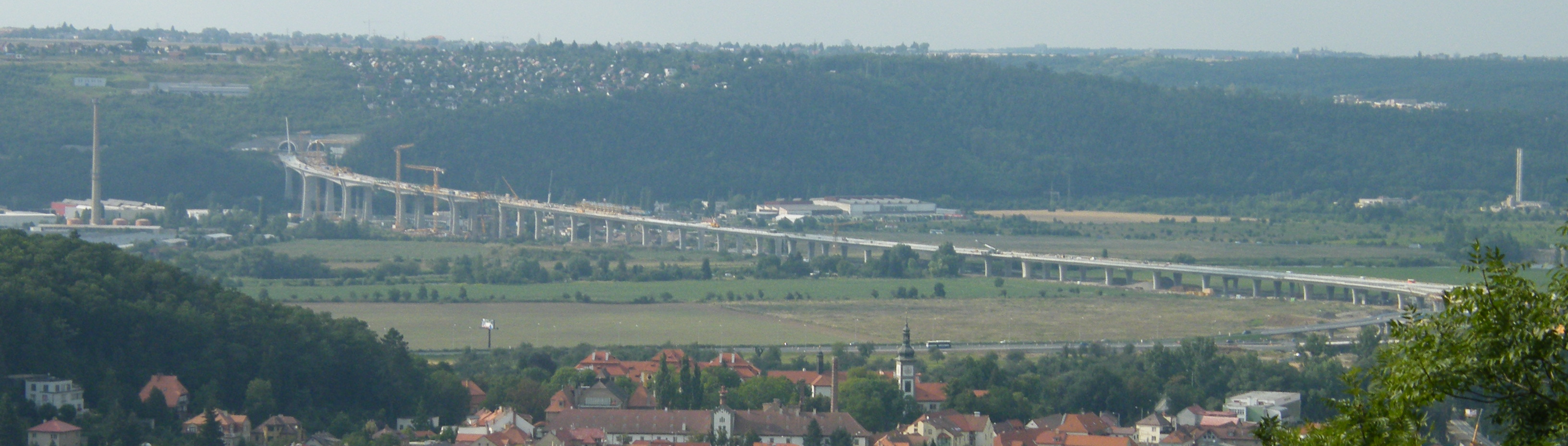 Stavba dálničního obchvatu Prahy (R1), úsek přes Lahovice, stav srpen 2009, foceno z 49°57'54.79"N, 14°24'4.085"E (Výhled cestou na Závist)